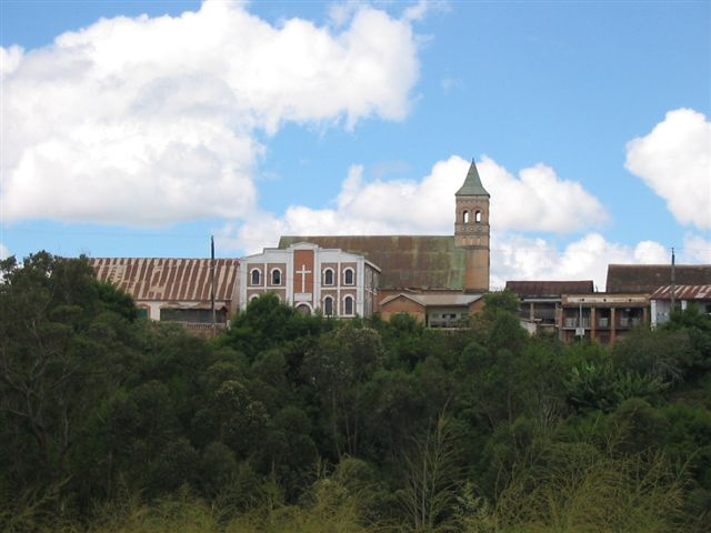 église FJKM d'Anjozorobe